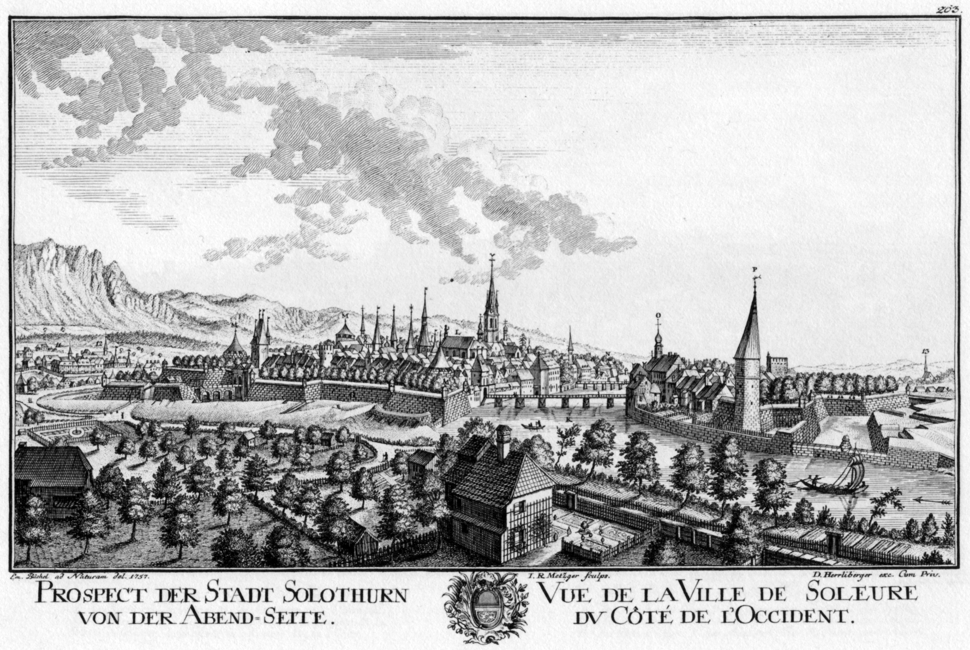 Ansicht der Stadt Solothurn 1757. Blatt 203 in der Topographie der Eidgenossenschaft, zweite Lieferung 1758–1762/63. Stich von J. R. Metzger, nach einer Zeichnung von Emanuel Büchel. Herausgegeben von David Herrliberger.